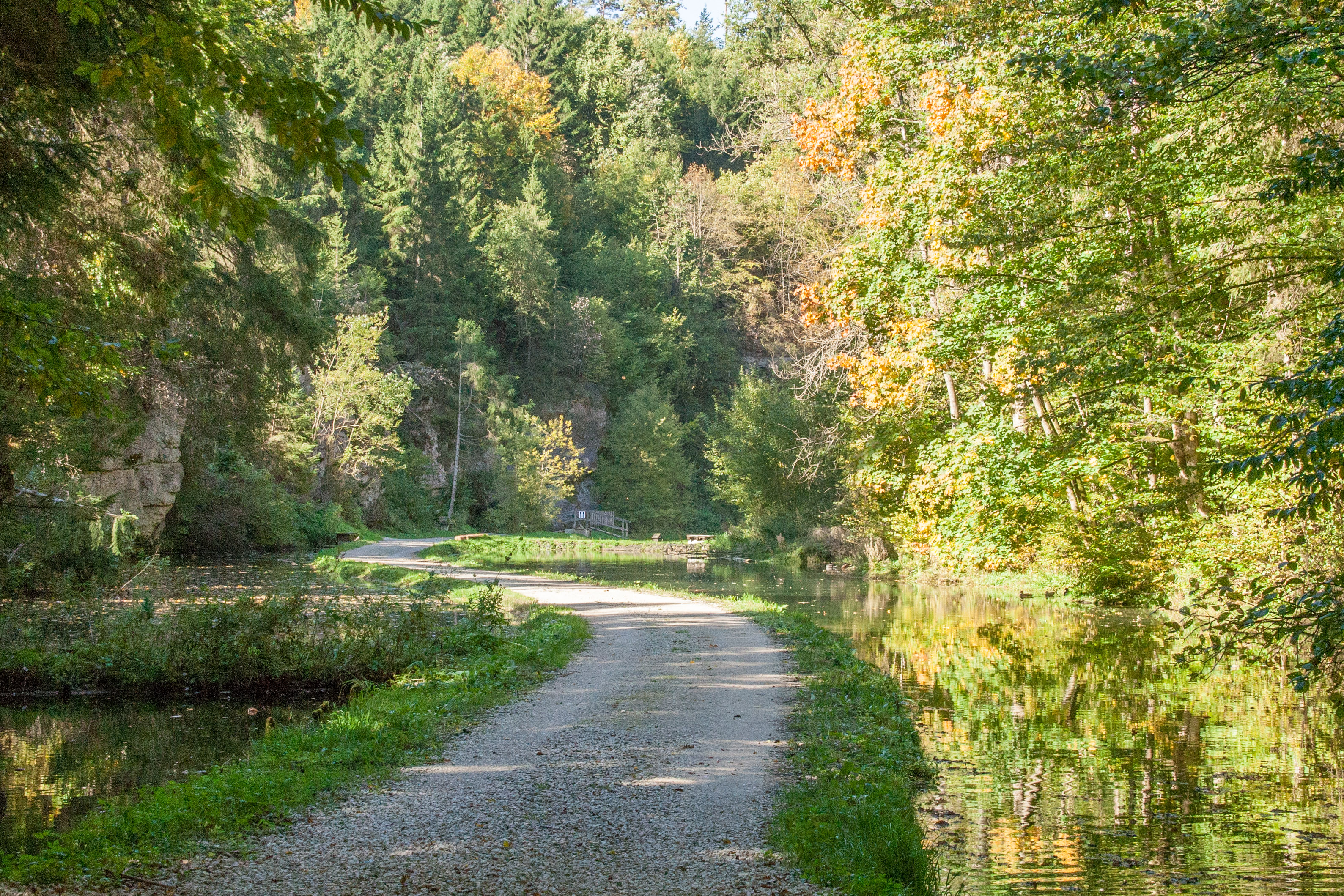 Klumpertal, Pottenstein, LSG "Fränkische Schweiz - Veldensteiner Forst"